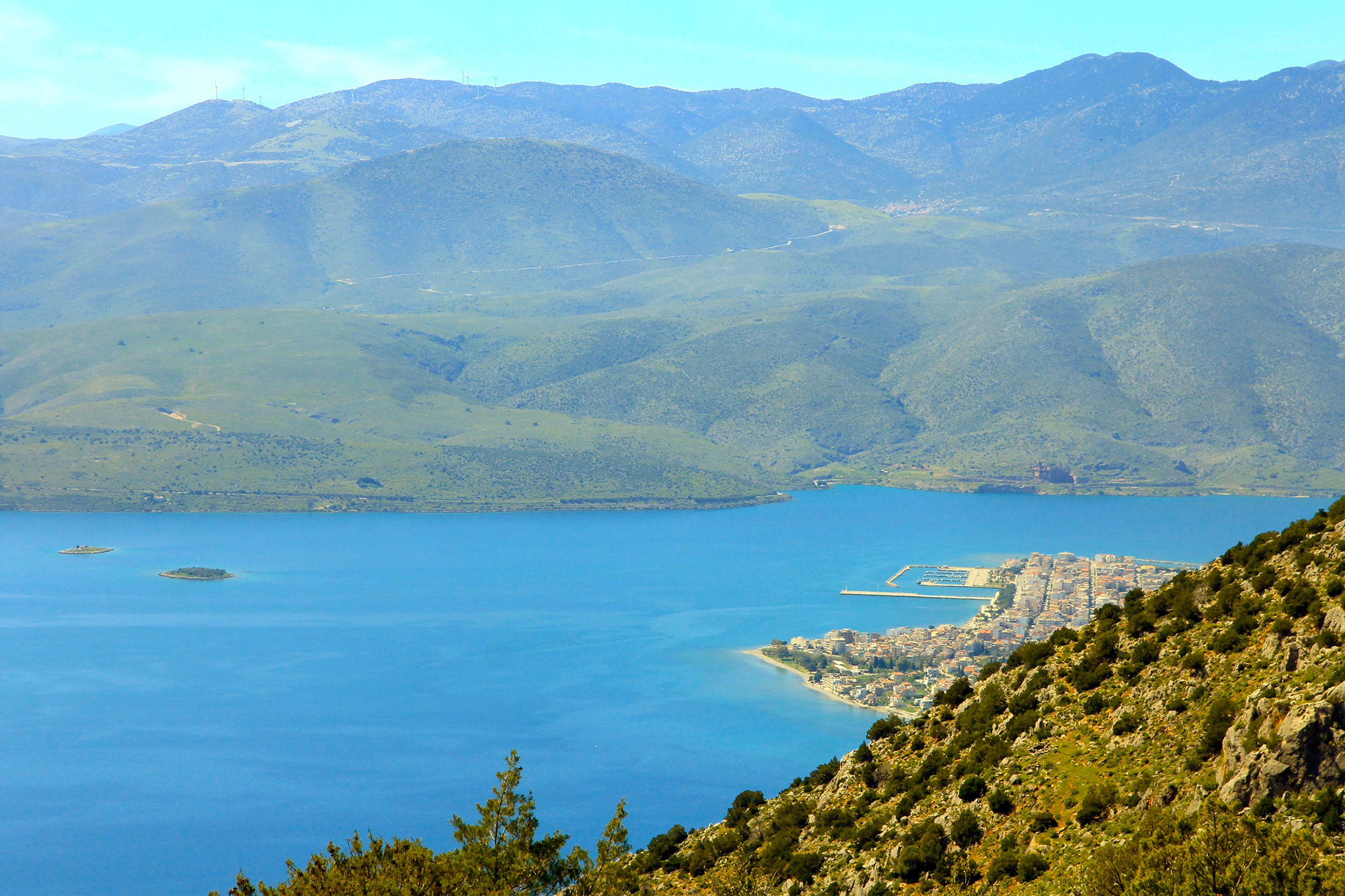 Ο Κρισσαίος κόλπος (ή Κόλπος της Ιτέας) με τις βραχονησίδες και η κωμόπολη της Ιτέας, όπως φαίνονται από ψηλά.